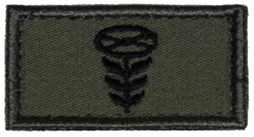 Fahrer